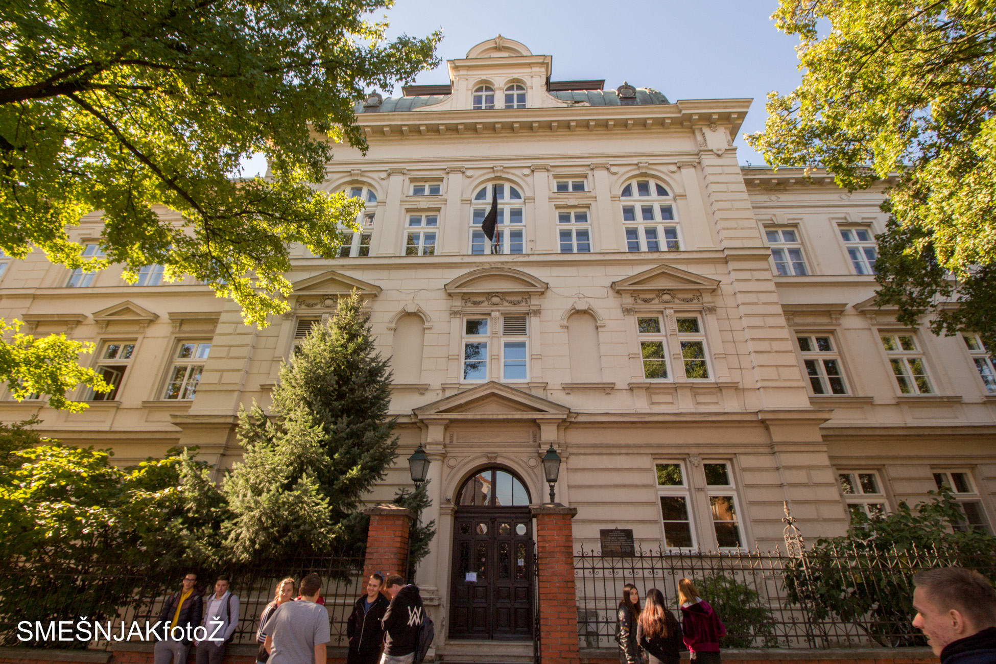 Zgrada gimnazije, Matice Hrvatske 17